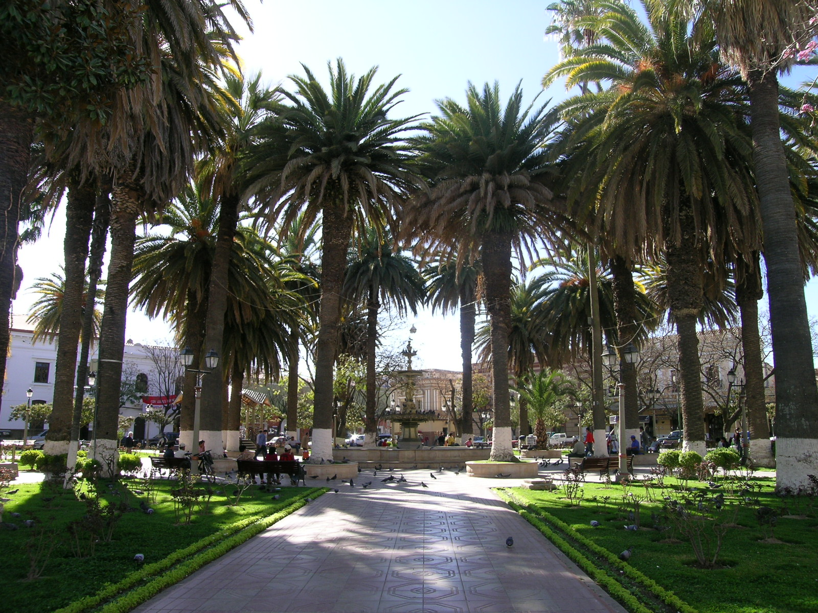 Plaza Principal in Tarija (Bolivien)